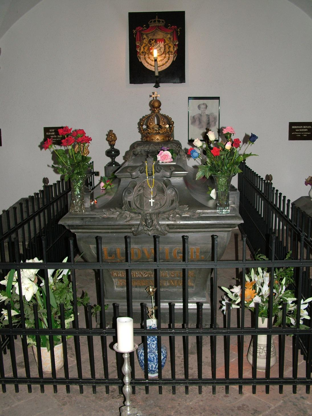 Sarkophag von König Ludwig II. von Bayern in der Michaelskirche München, Neuhauser Strasse